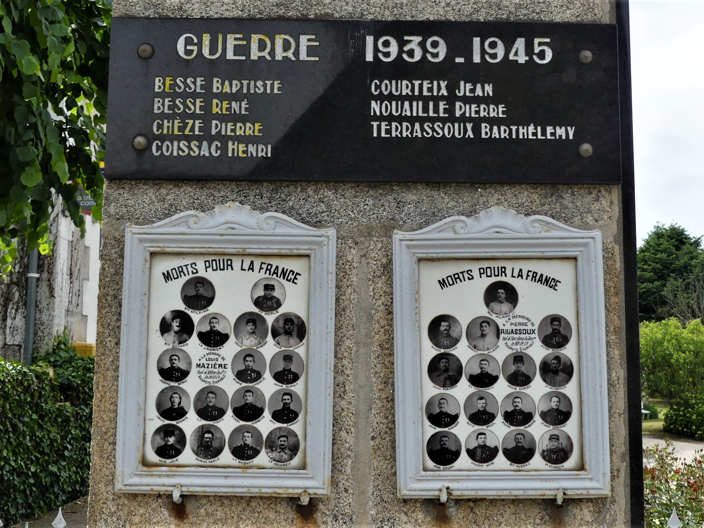 Détail du monument aux morts d'Eyburie, Corrèze, France.